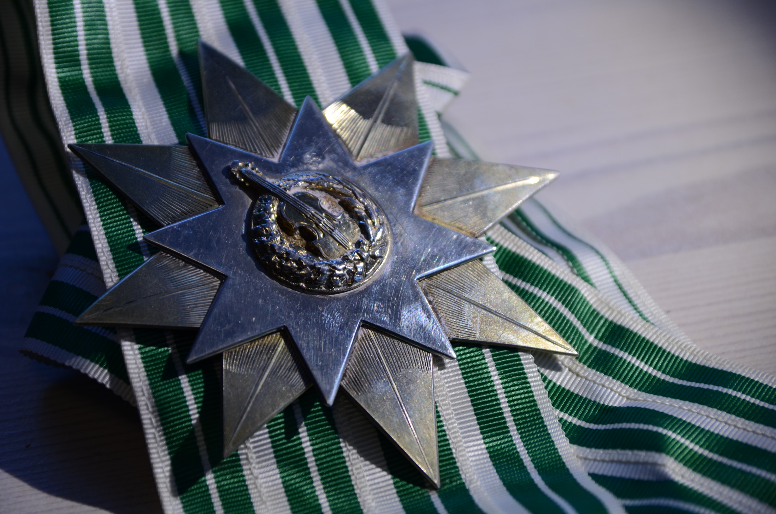 Storkors. Foto: Claudia Bätcke